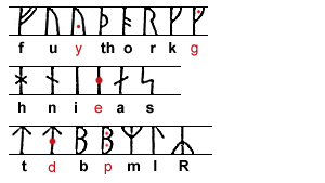 Runsten.